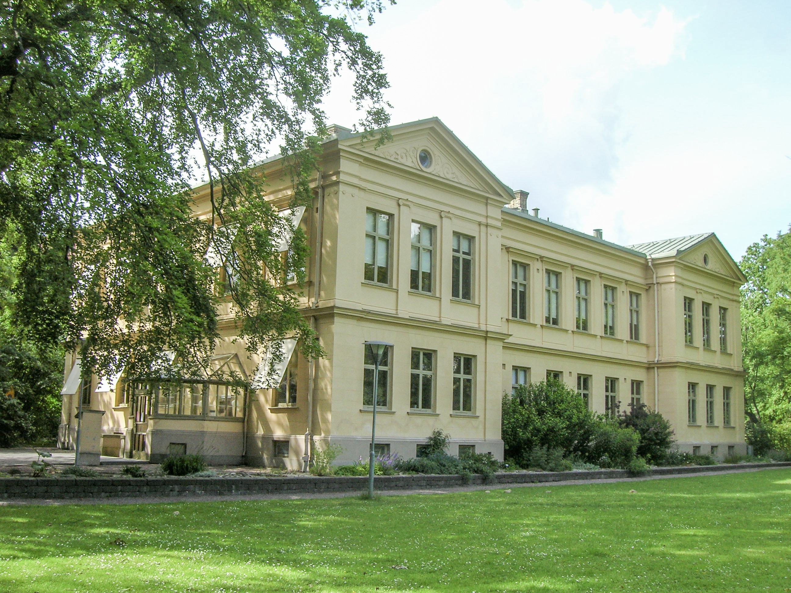 Öresundshuset i Botaniska trädgården i Lund.